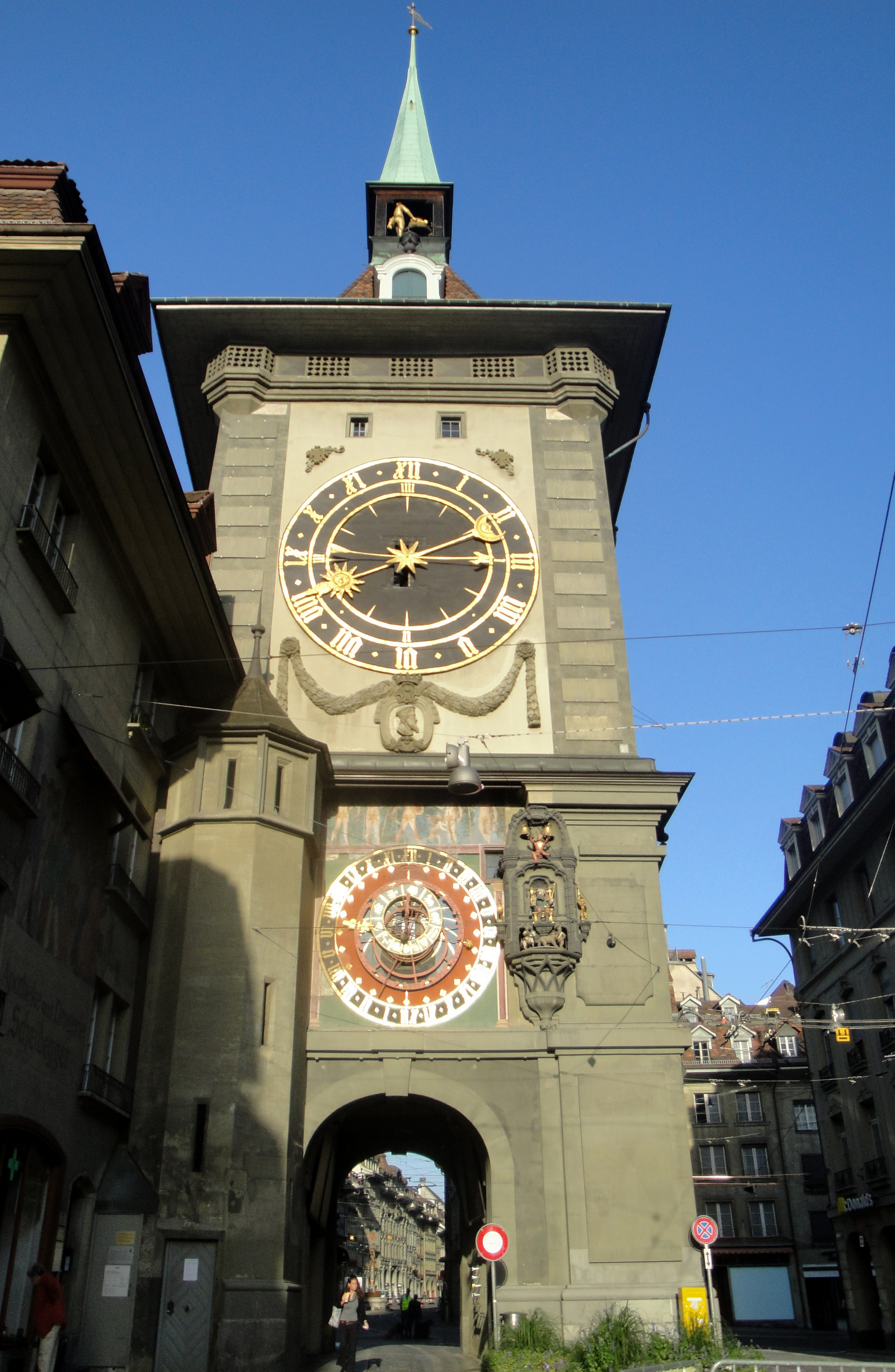 Bern, Zytglogge